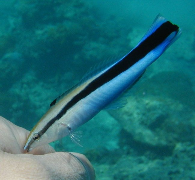 ホンソメワケベラ。座間味島で投稿者撮影。